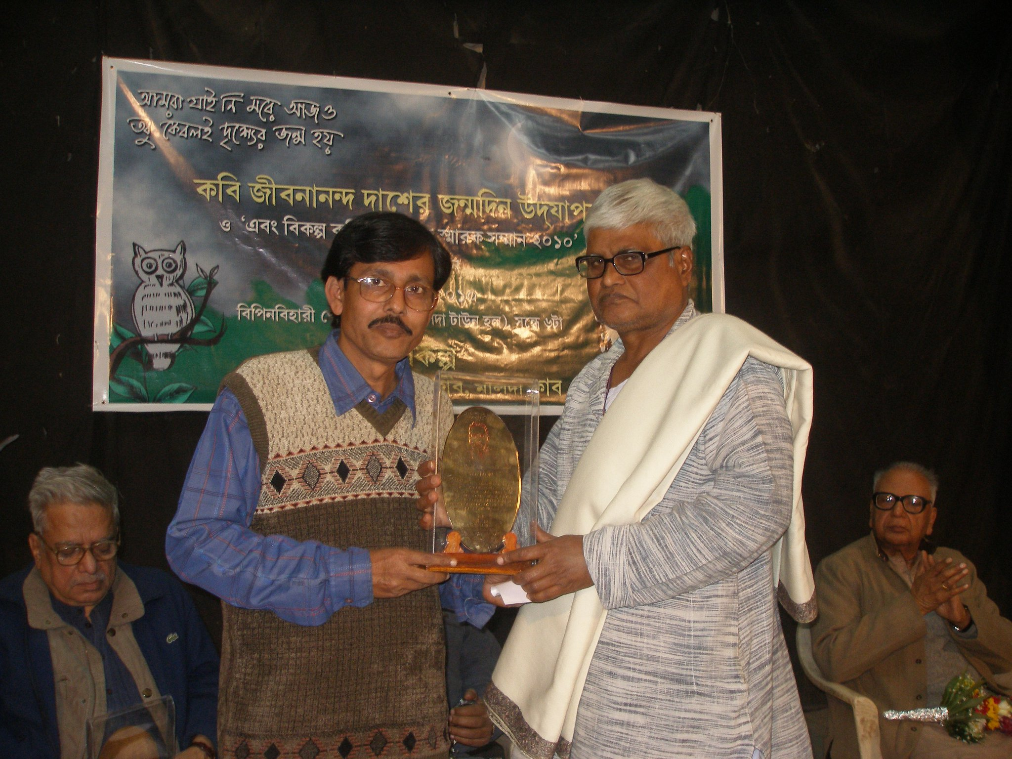 অরুণেশ ঘোষ Arunesh Ghosh